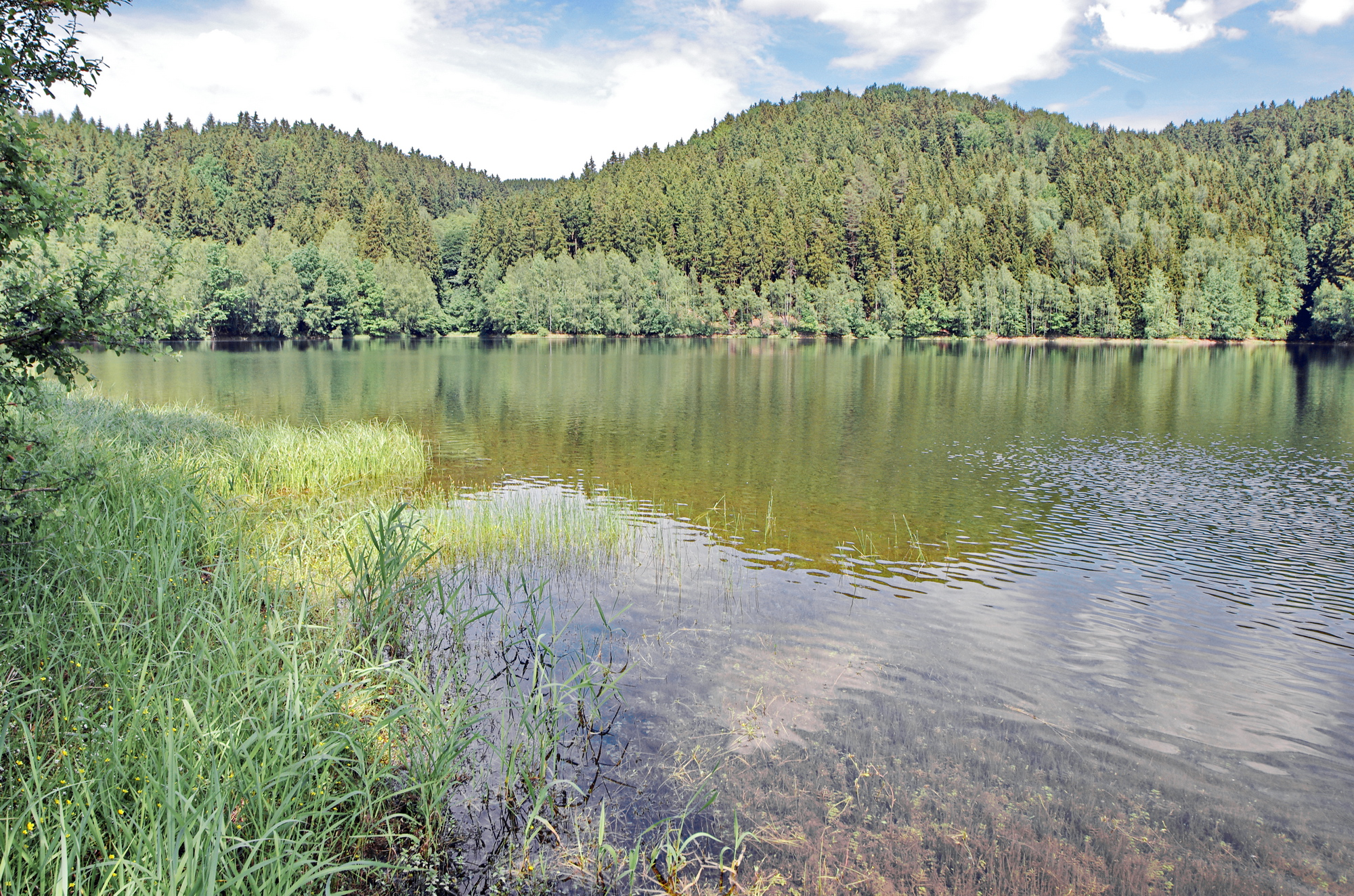 Vodní nádrž Horka, okres Cheb